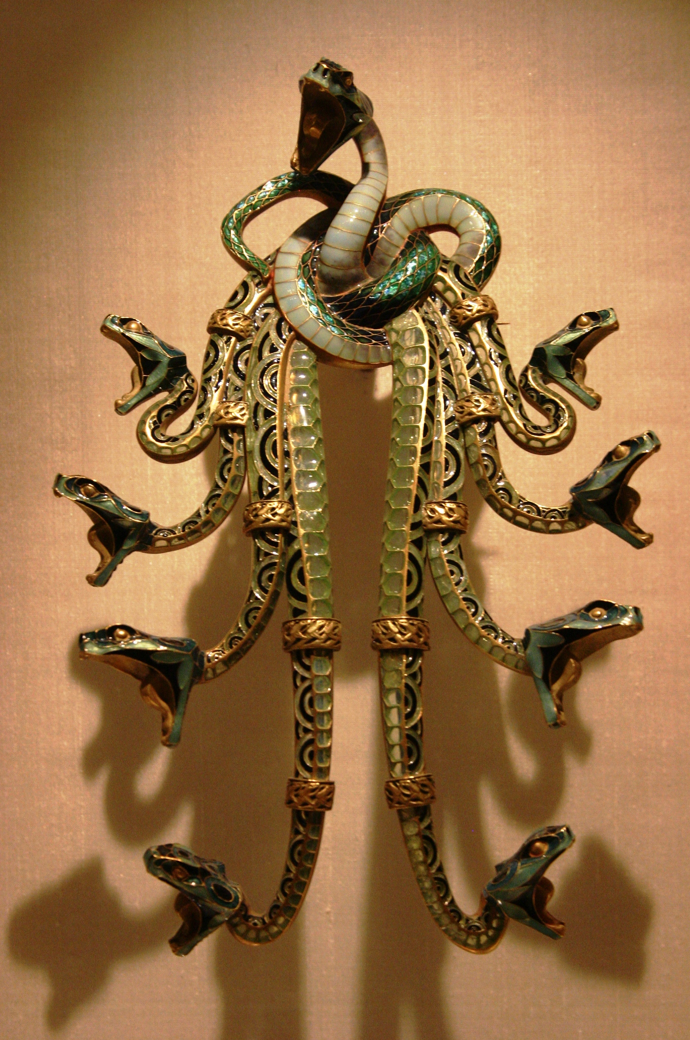 Broche de Lalique